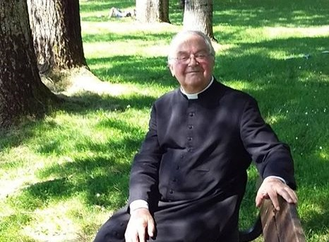 M. l'abbé Paul Aulagnier en juin 2020, dans le jardin du couvent St Paul, à Thiviers